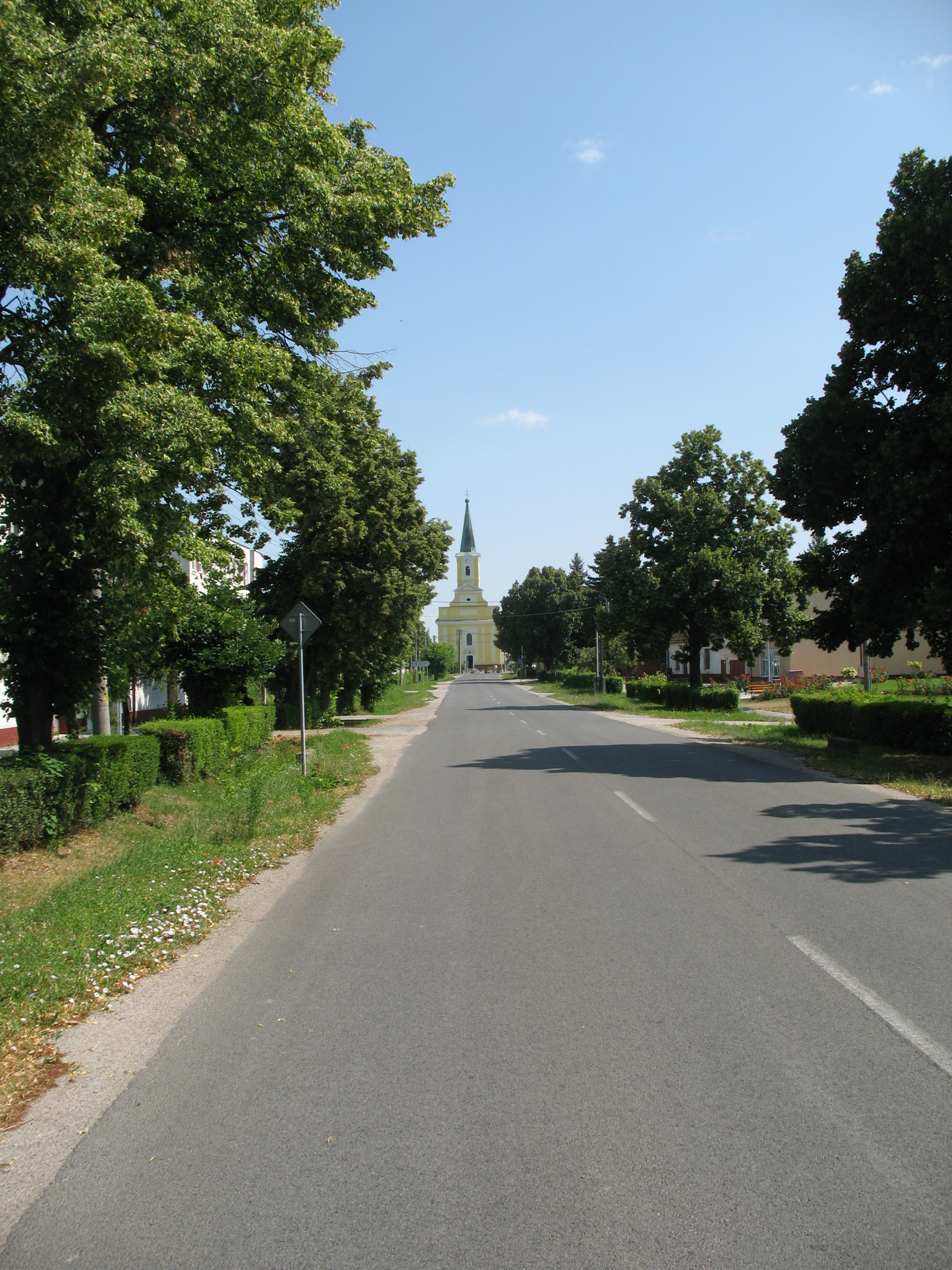 Hlavná cesta v Horných Salibách